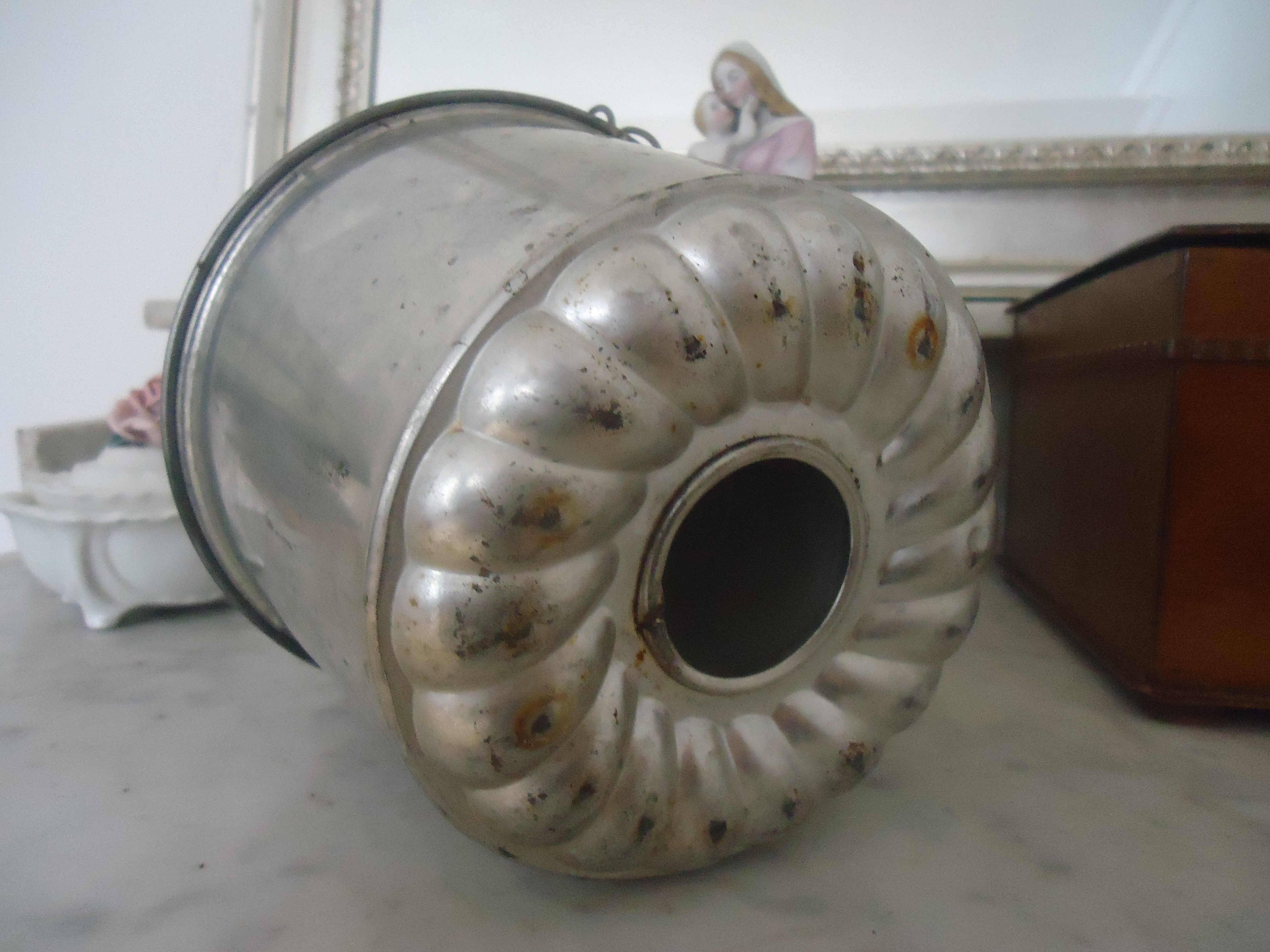 alte französische Eiscremeform